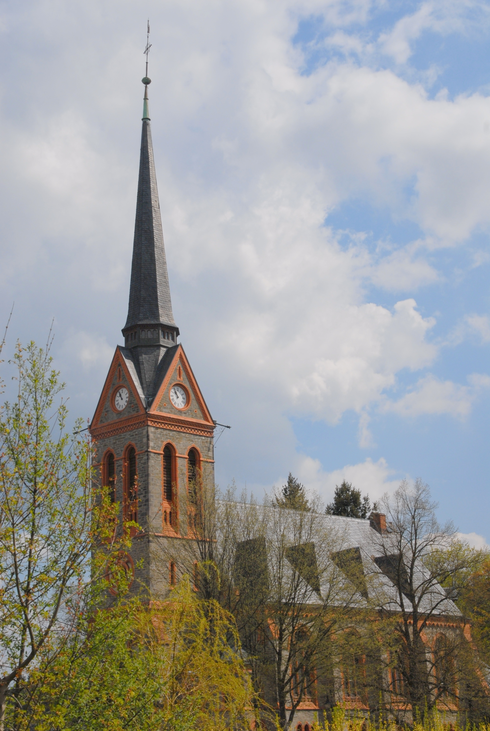 Bad Elster, St. Trinitatiskirche, Außenansicht von Südwest